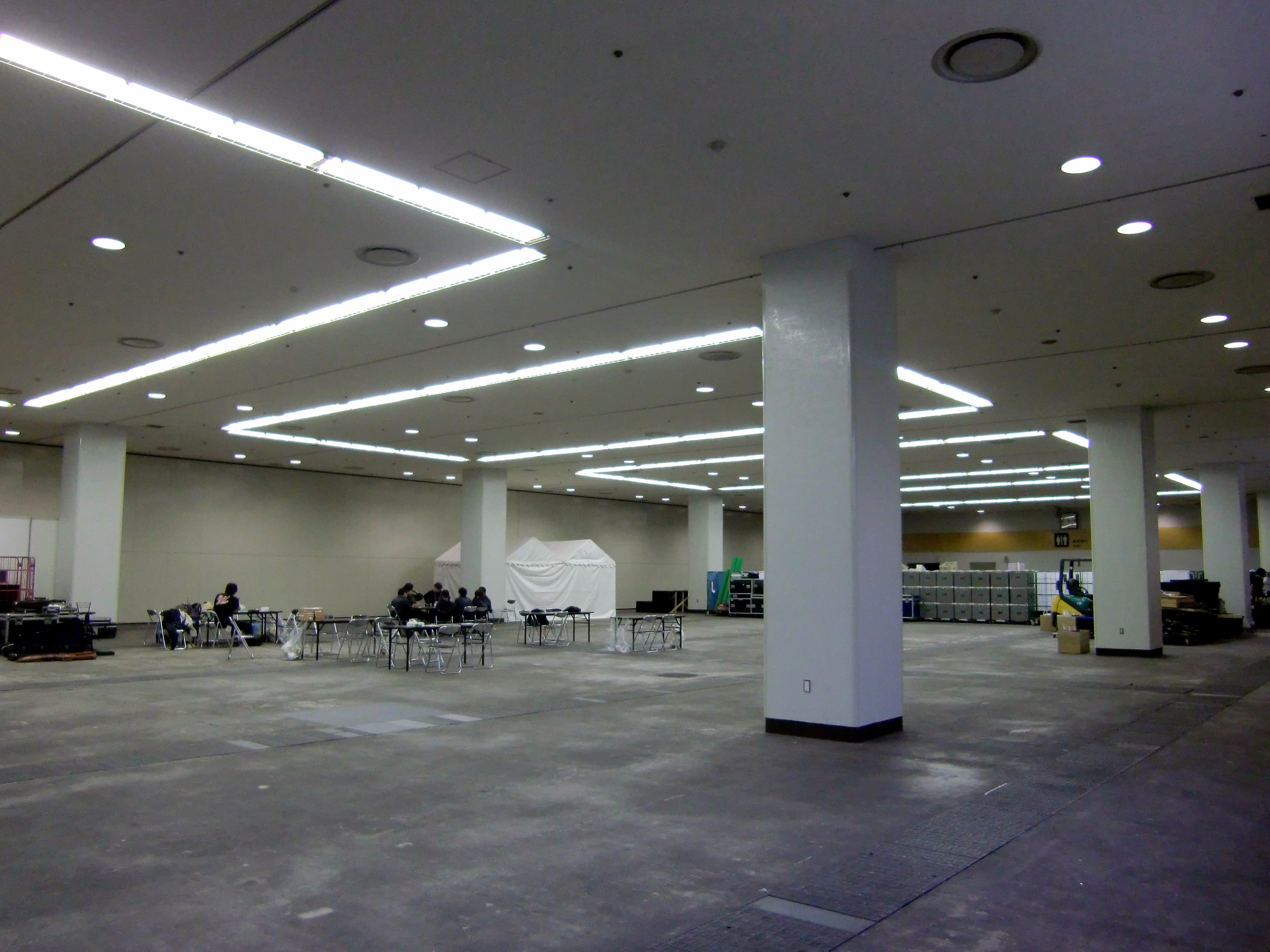 大阪国際見本市会場 ５号館B 内部